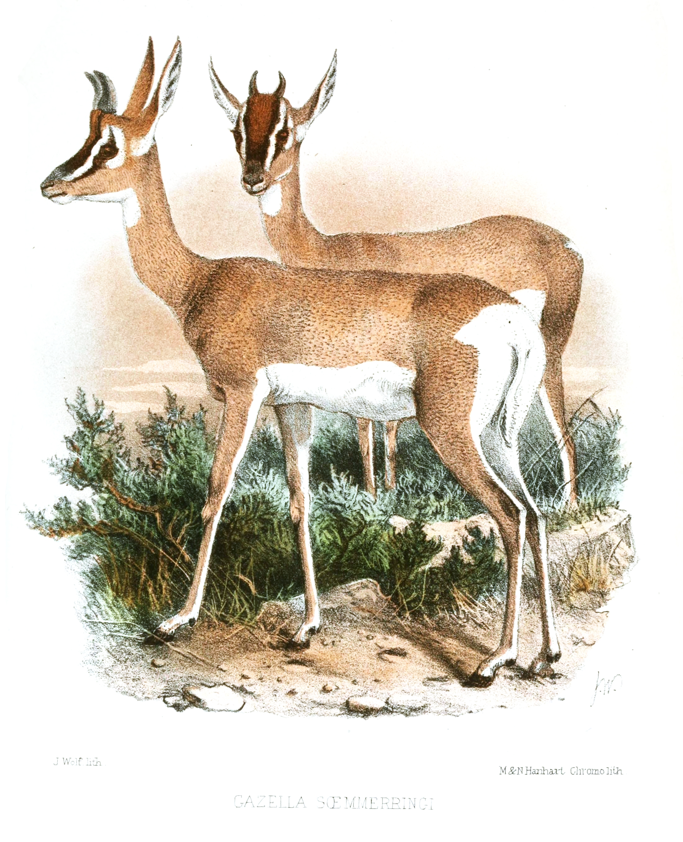 Gazella soemmerringi = Nanger soemmerringii